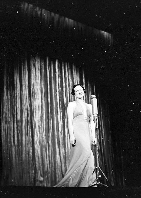 Scala (Berlin): Greta Keller singt